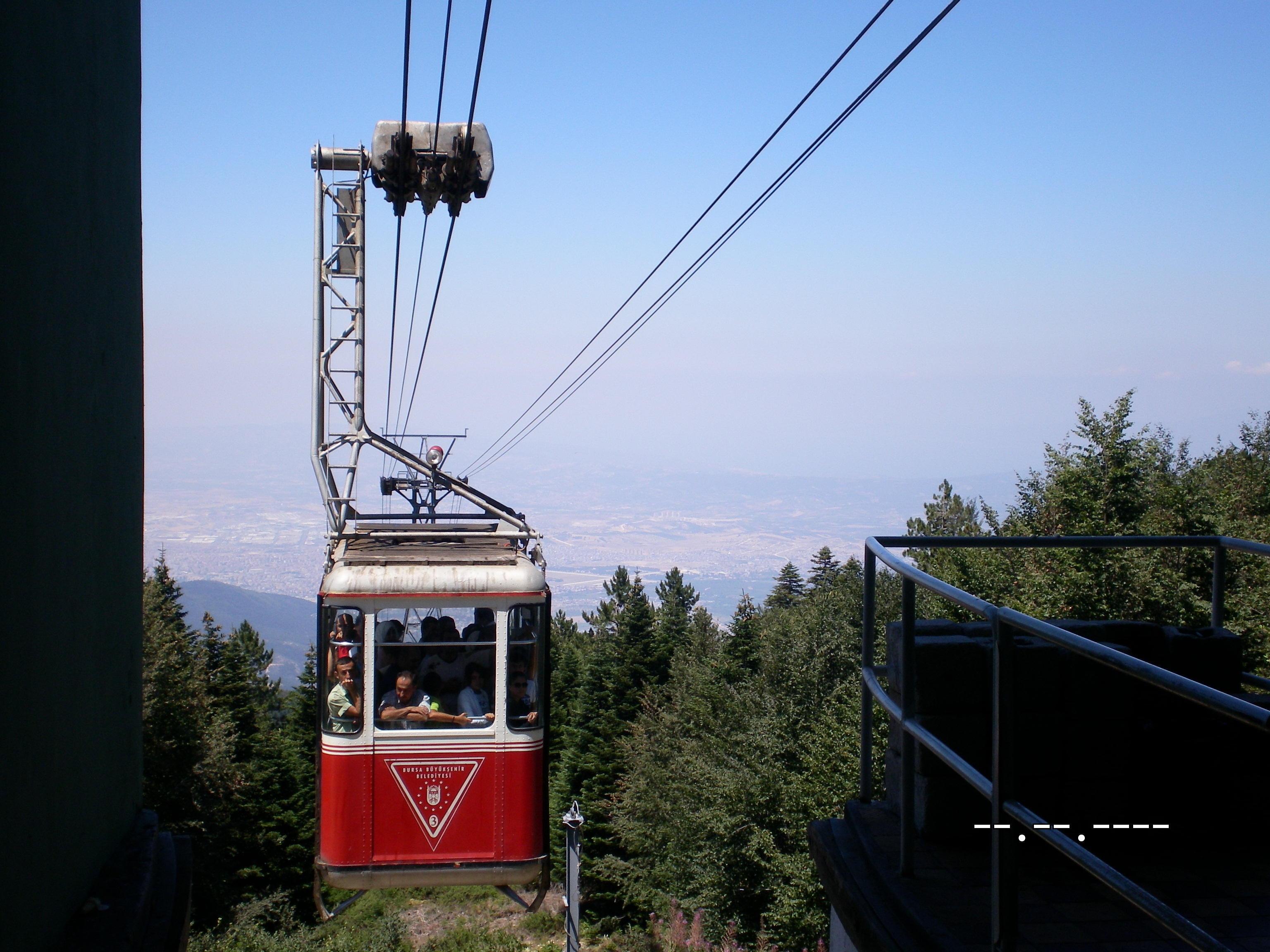 Bireysel Çalışma.(Kendim Çektim.)